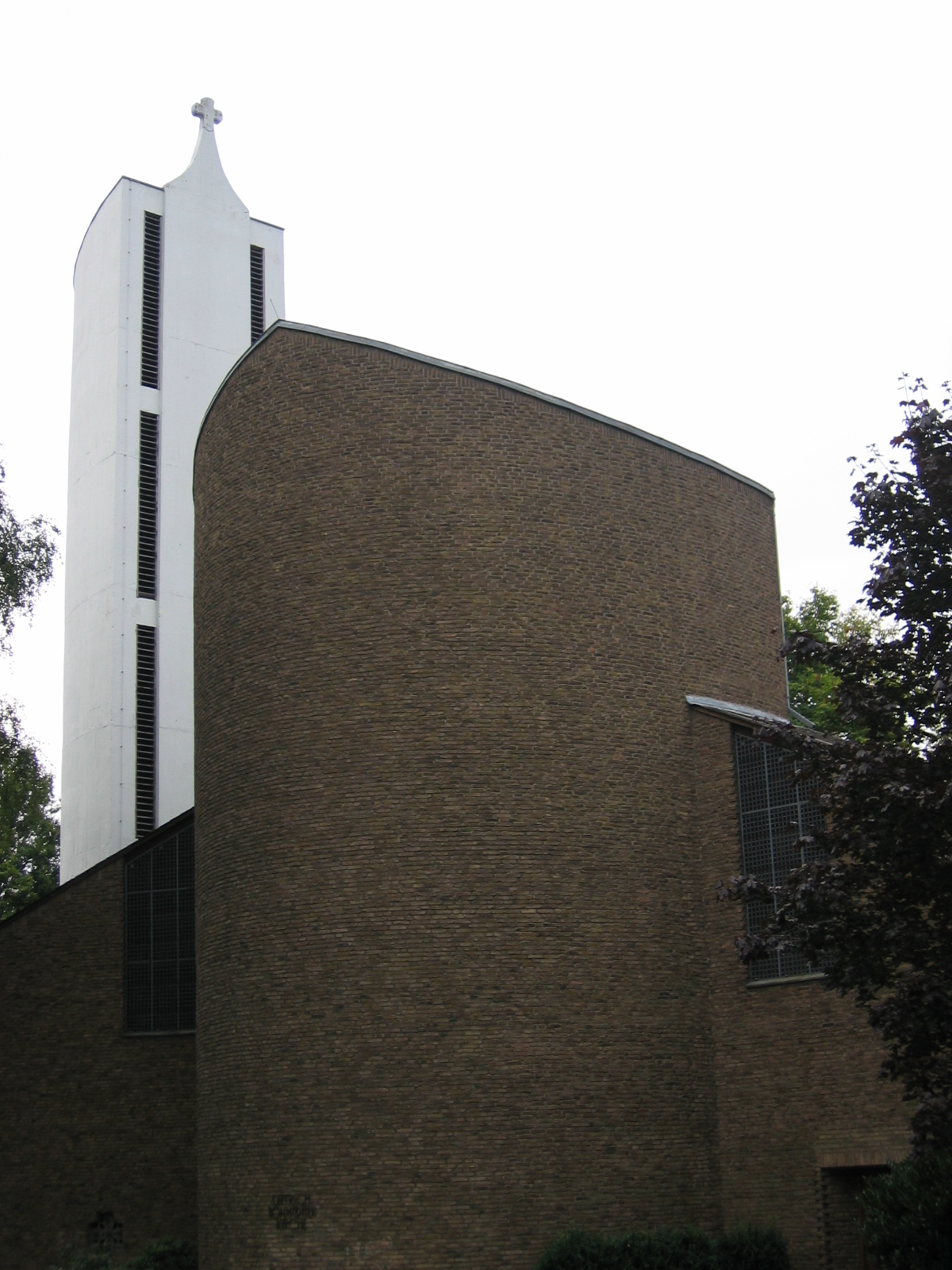 Ev. Dietrich-Bonhoeffer-Kirche in Köln-Junkersdorf